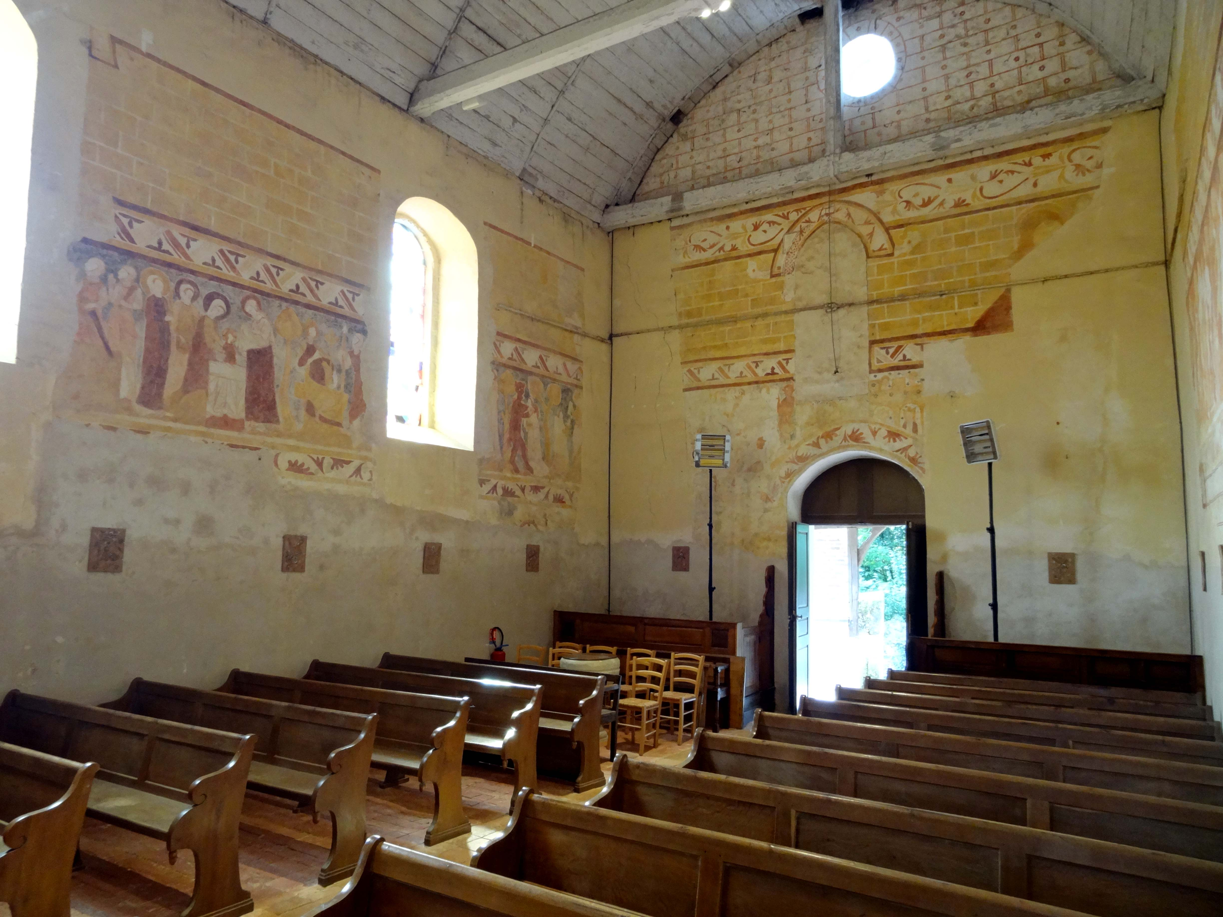 Intérieur de l'église - voir titre.